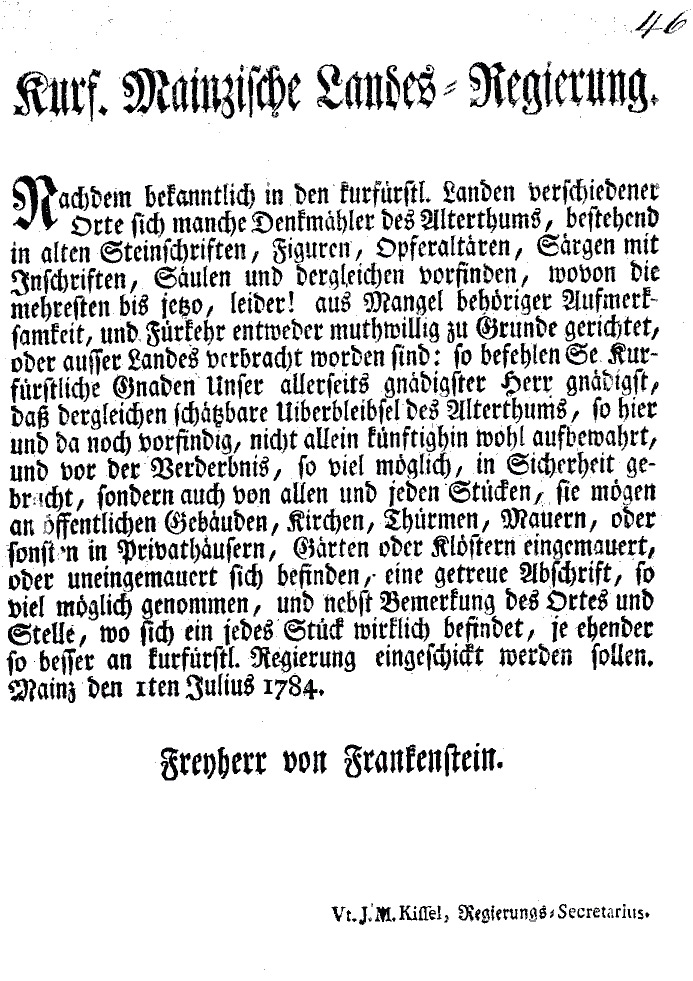 Denkmalpflege-Gesetz vom 1. Juli 1784 des Kurfürstentums Mainz.